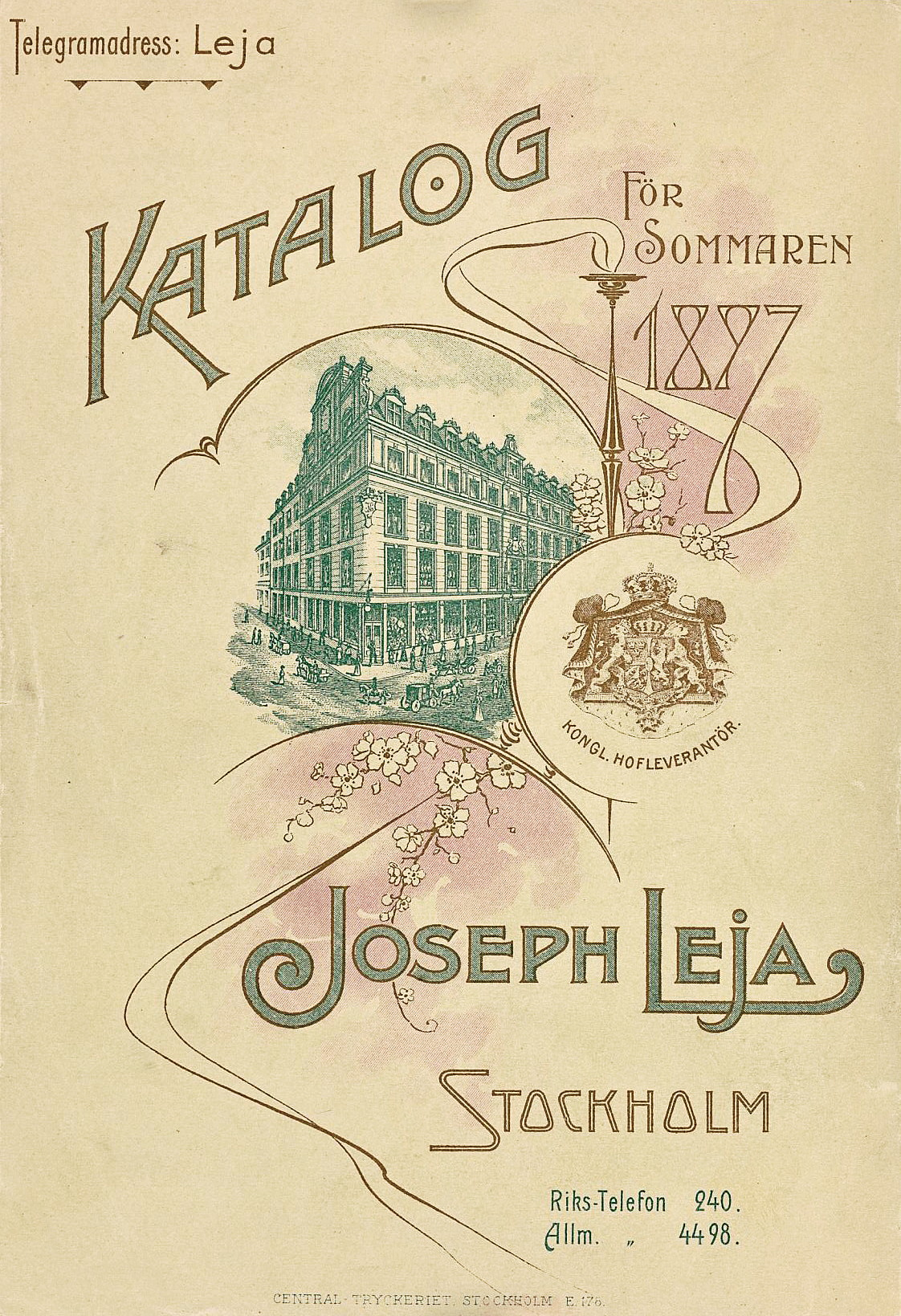 Varukatalog för firman Joseph Leja för sommaren 1897. I sortimentet fanns möbler, kläder, skor, leksaker, väskor m.m. Firman grundades 1852 av Josef Sachs morfar Joseph Leja.